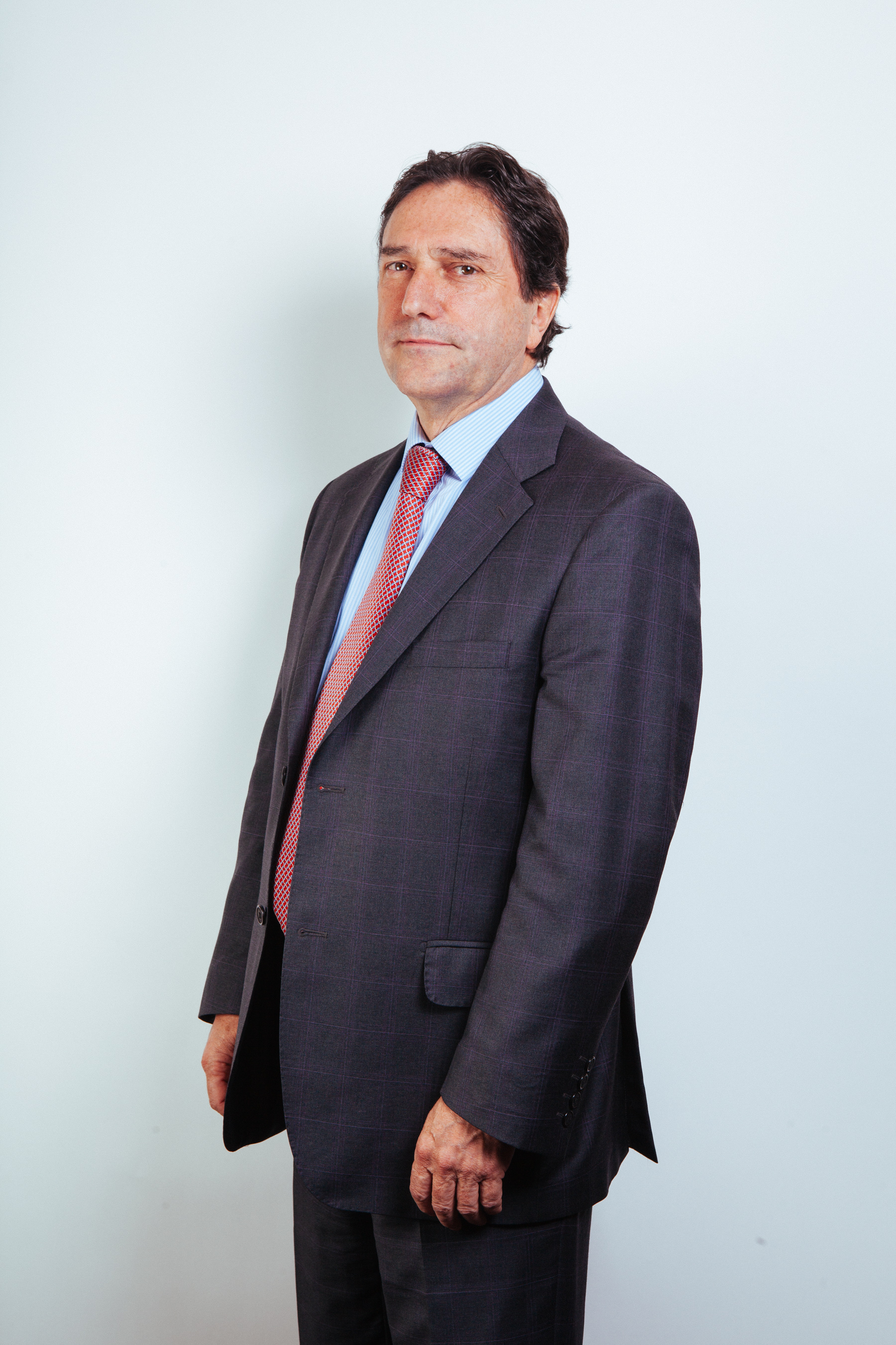 Ministro de Estado del segundo gobierno de Michelle Bachelet (2014-2018)